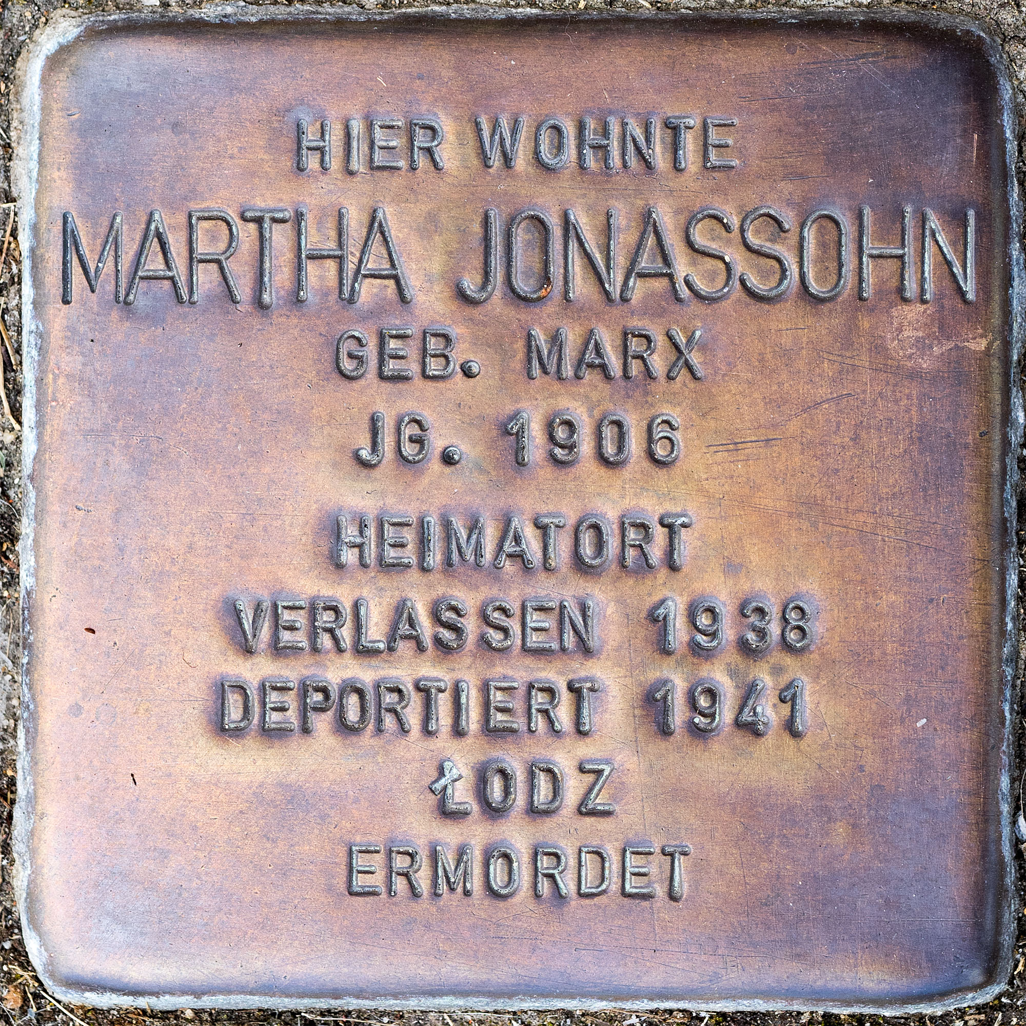 Stolpersteine Roki: Jonassohn, Martha